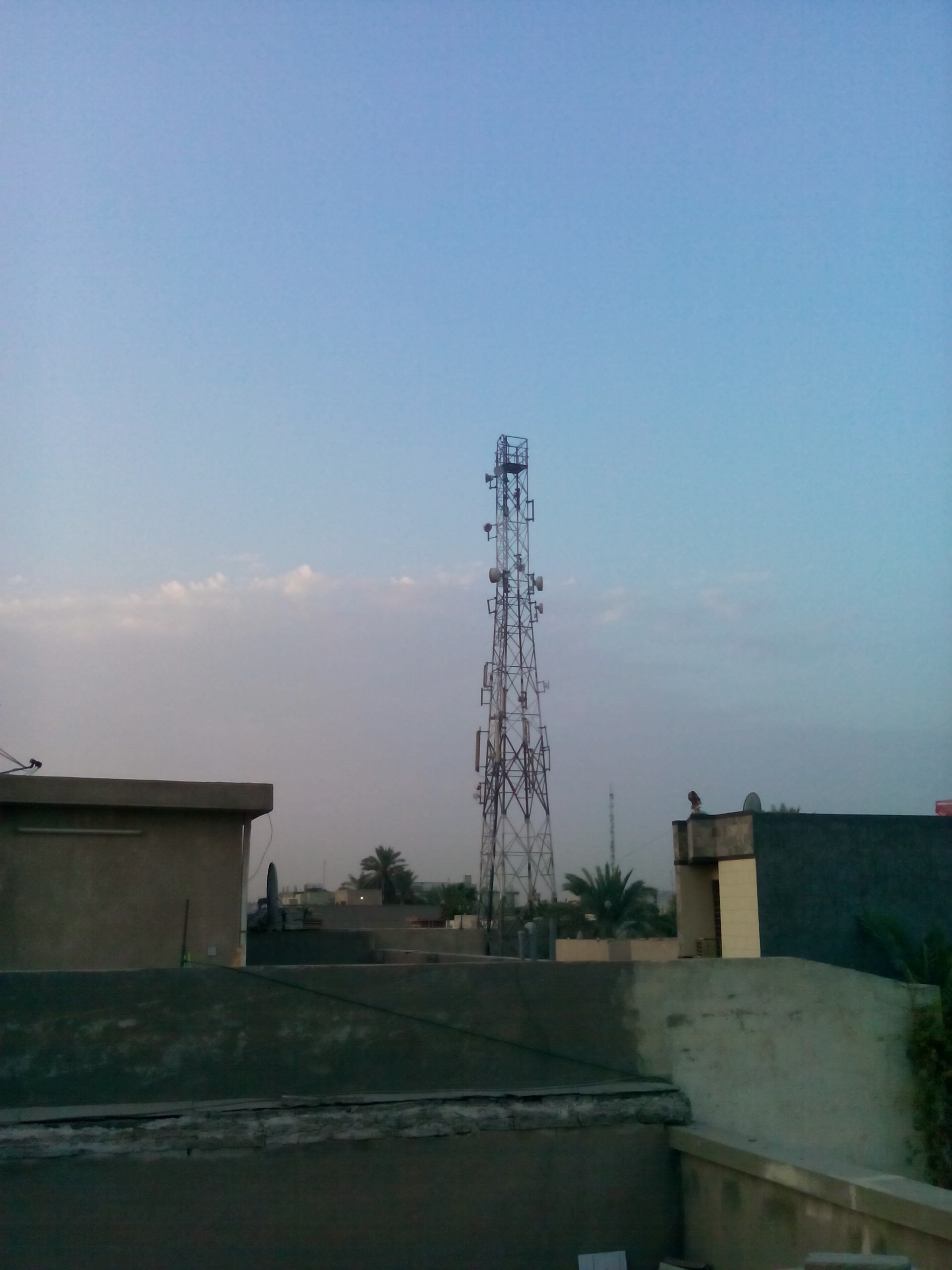 برج شبكة خلوية للهاتف النقال في بغداد